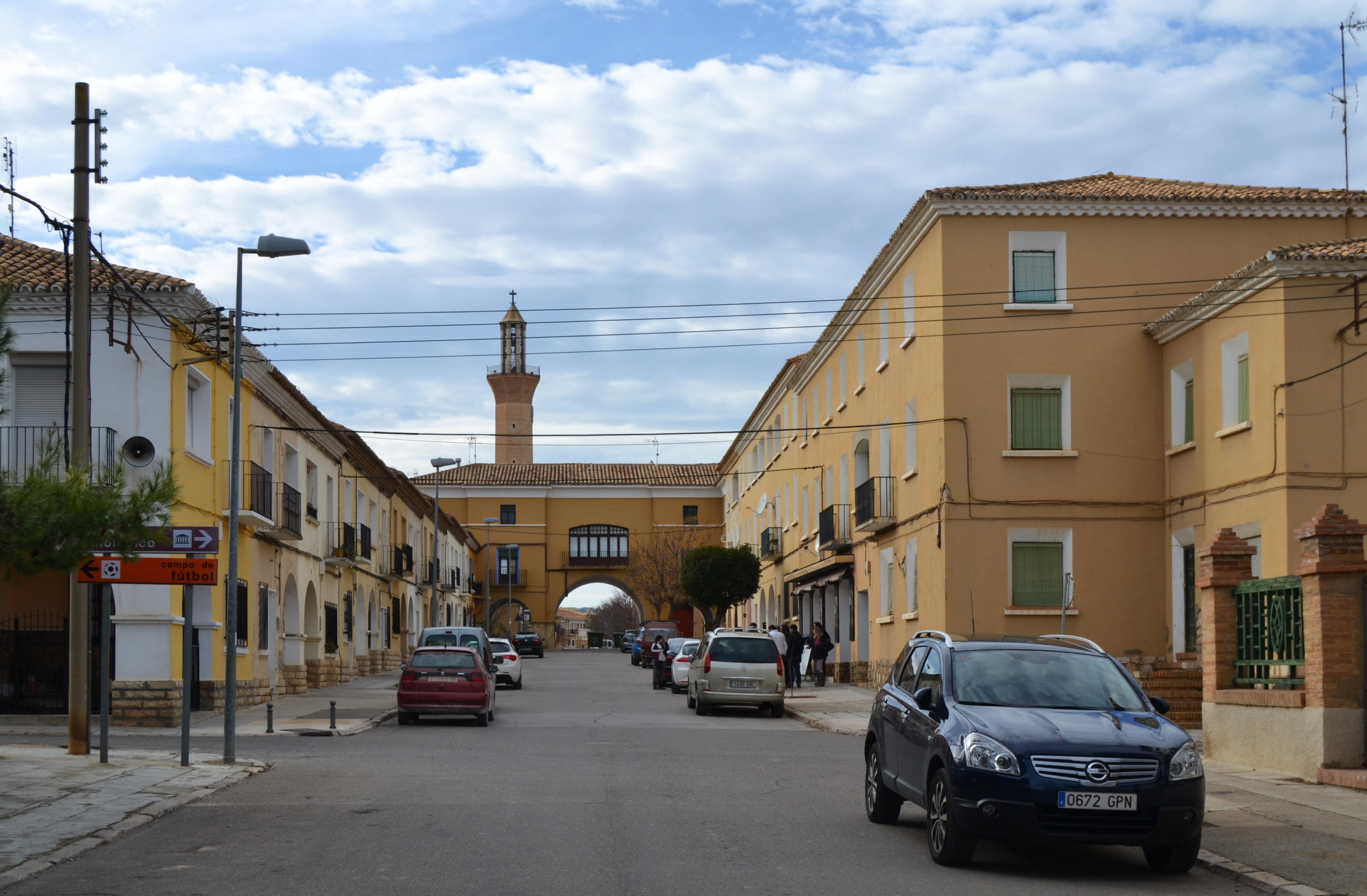 Carrer de sant Ramon de Belchit.